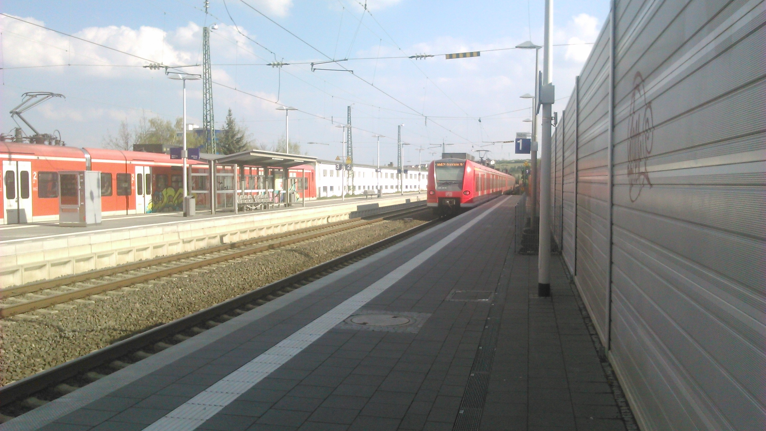 Der Bahnhof in Bodenheim. Rechts ein Zug der Baureihe 425 als RB 44 Richtung Mannheim fahrend, links ein Zug derselben Baureihe und Linie auf dem Weg nach Mainz.